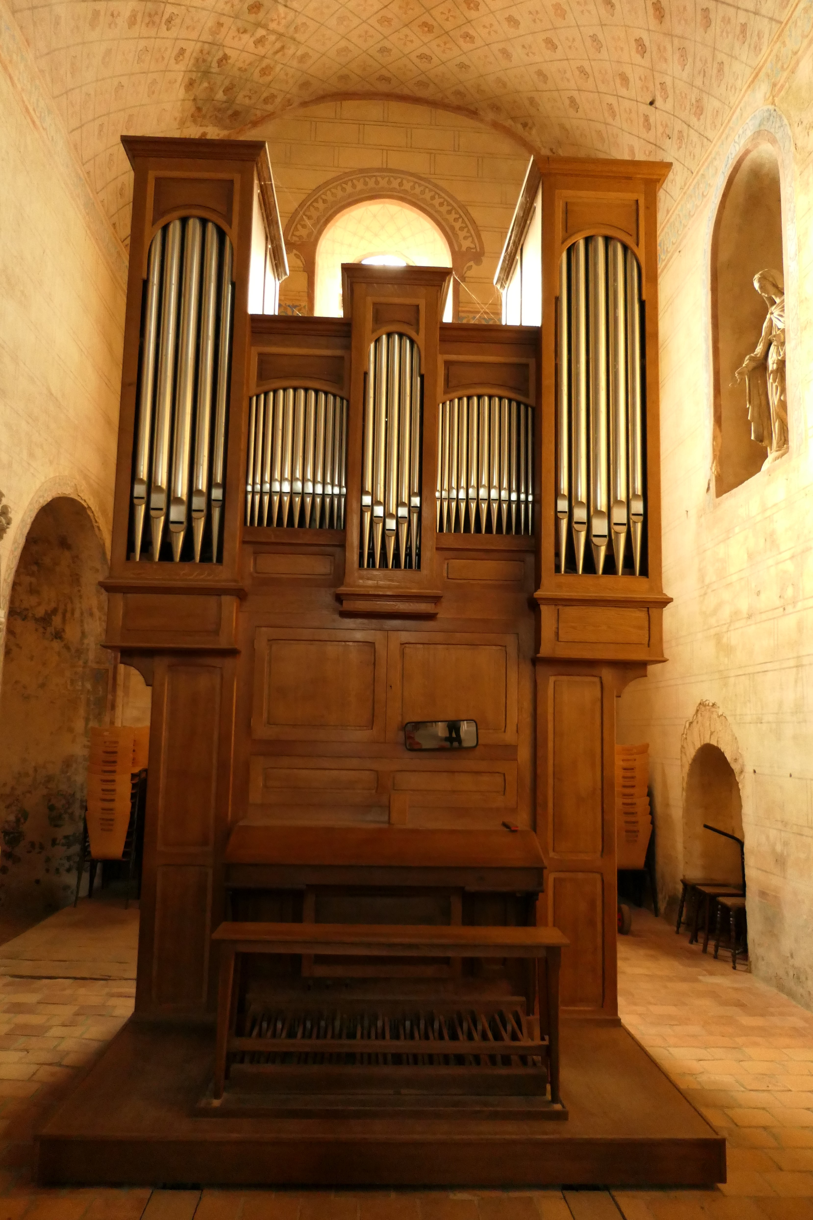 Anzy-le-Duc, orgue